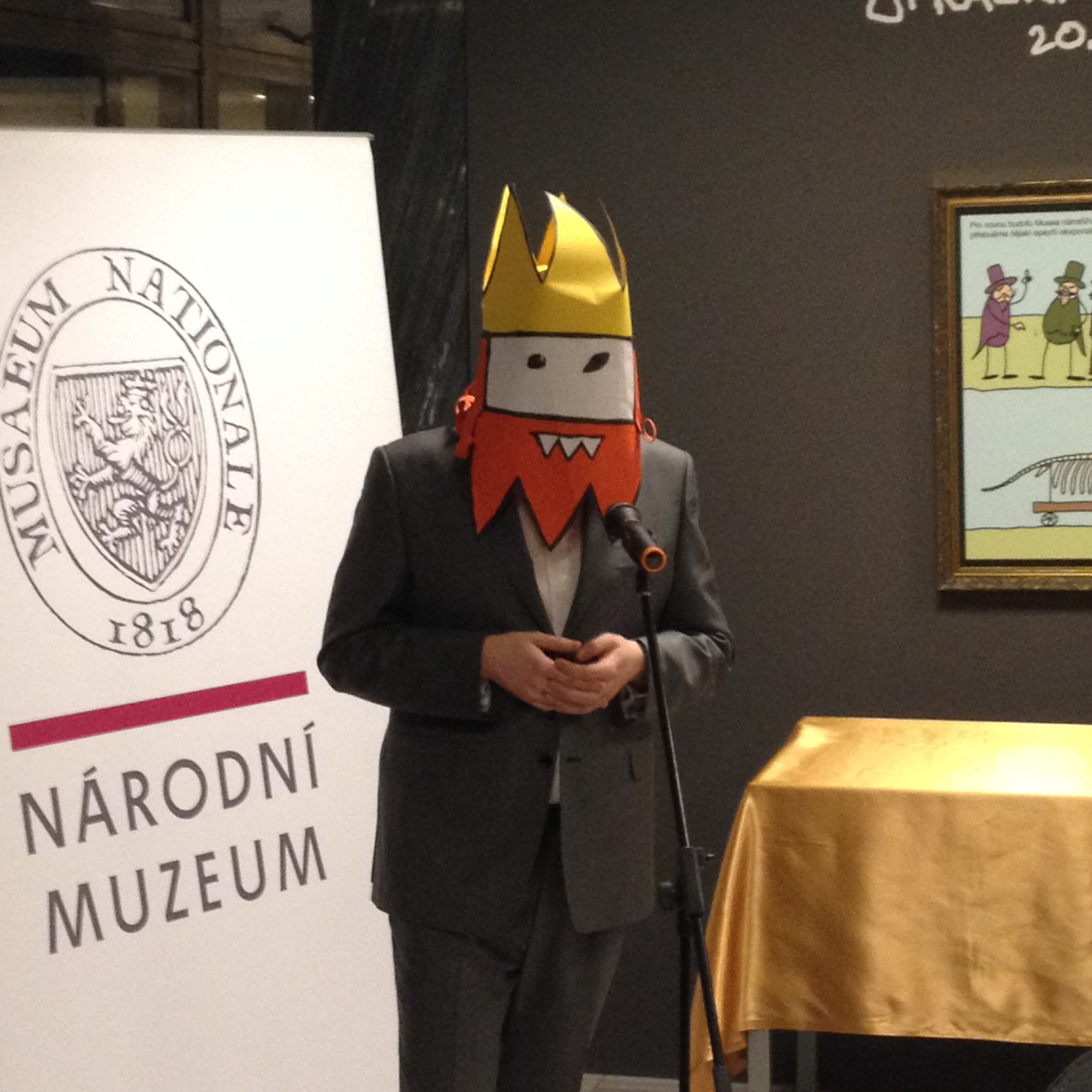 Autor Obrásků sčeskí historje, známý jen pod pseudonymem Jaz, v masce Zmikunda v Národním muzeu